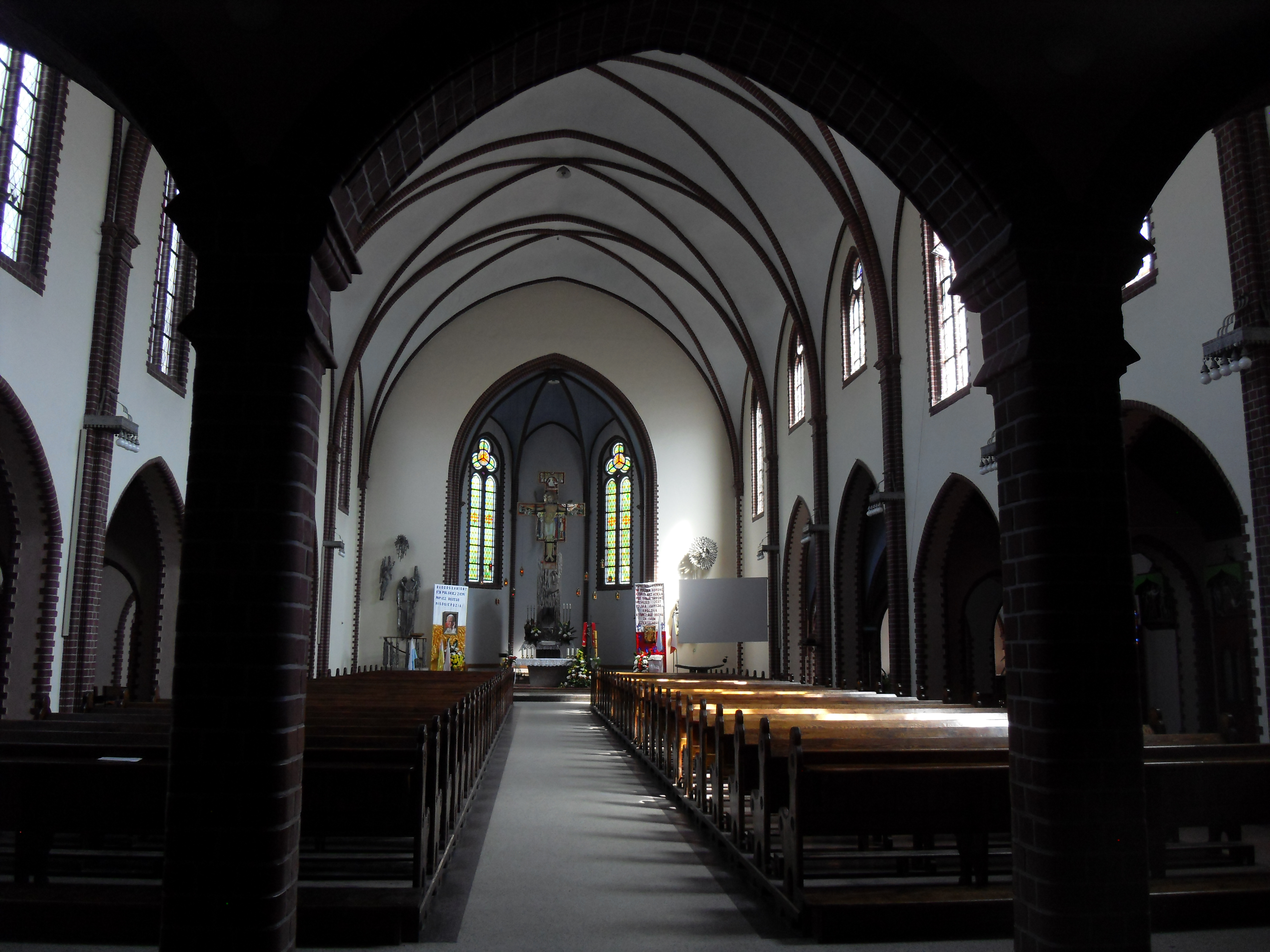 Gdańsk Siedlce. Kościół świętego Franciszka z Asyżu, ul. Kartuska 186.